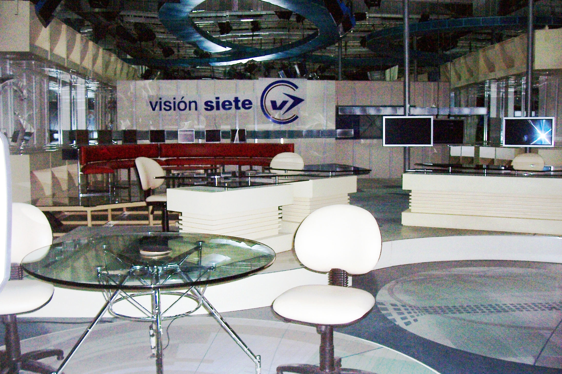 El Estudio de Visión Siete Noticias (V7), el noticiero de Canal 7 Argentina. Agradecimientos: Hugo Barcia, Subgerente de Relaciones Institucionales y Prensa. Canal 7 Argentina.